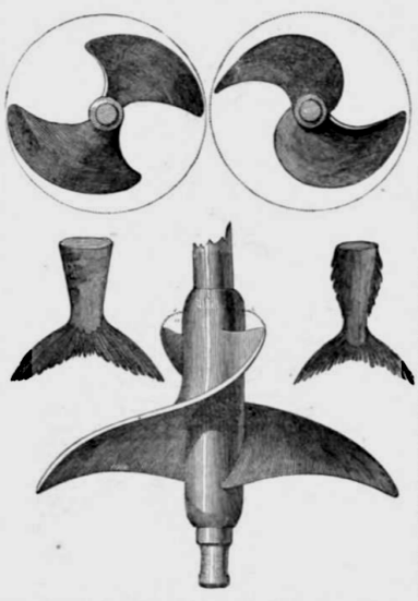 George Rennie's System der archimedischen Schraube.